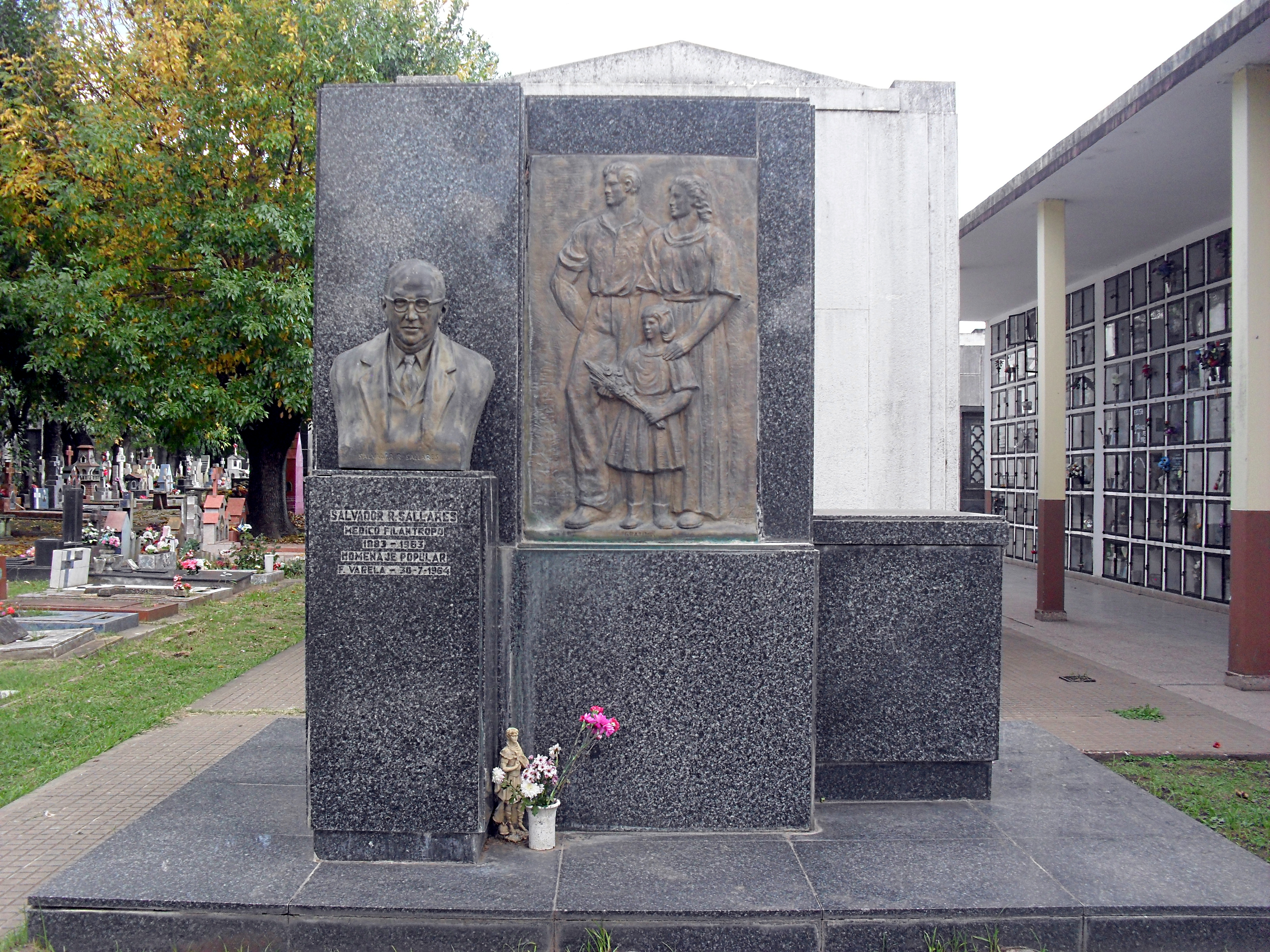 Tumba Dr Salvador Sallarés